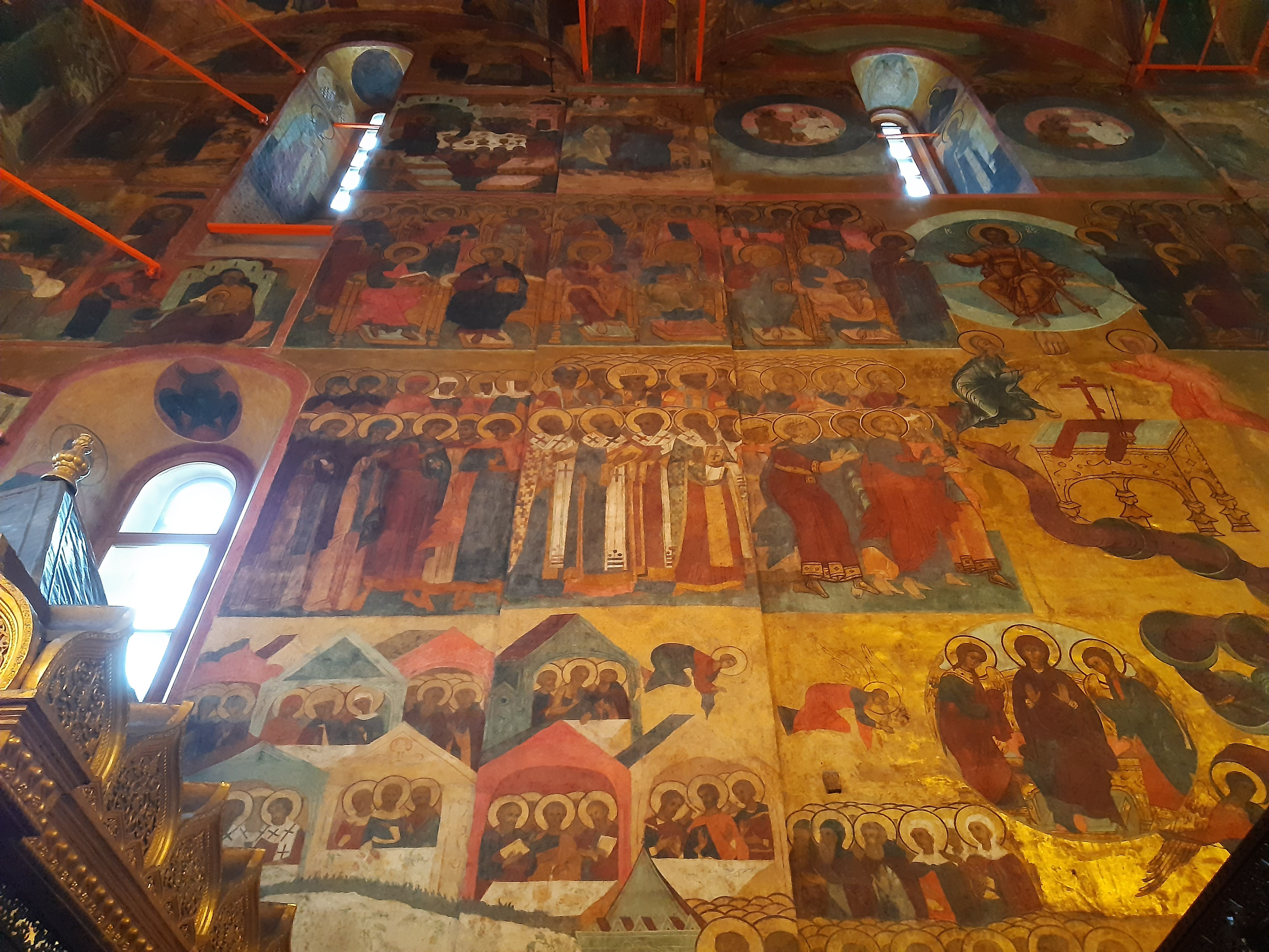 Успенский собор Московского Кремля, интерьер